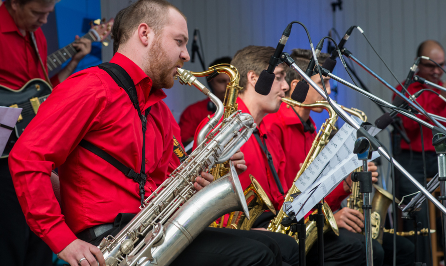 XIX Московский международный фестиваль «Джаз в саду “Эрмитаж”»